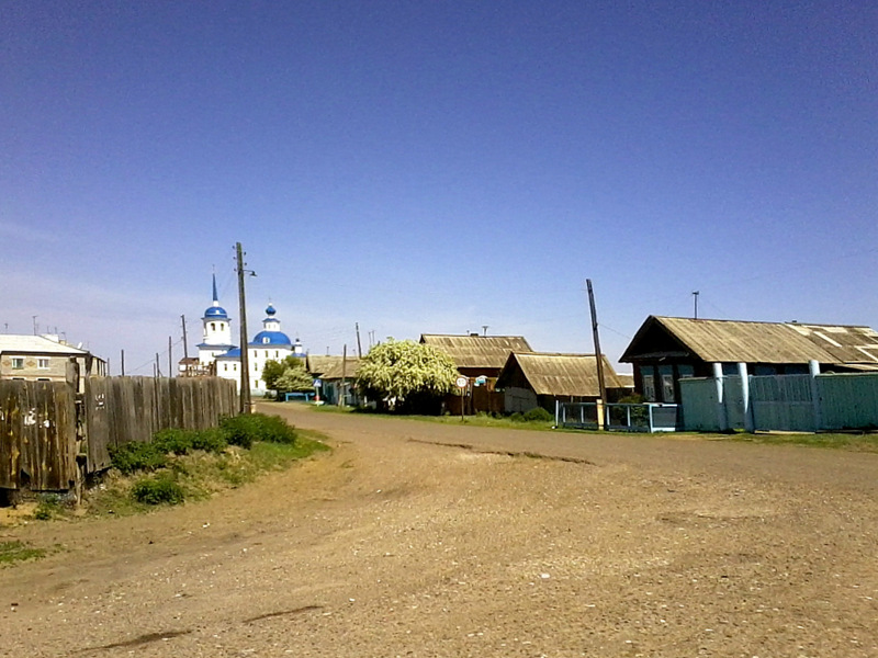 Творогово.